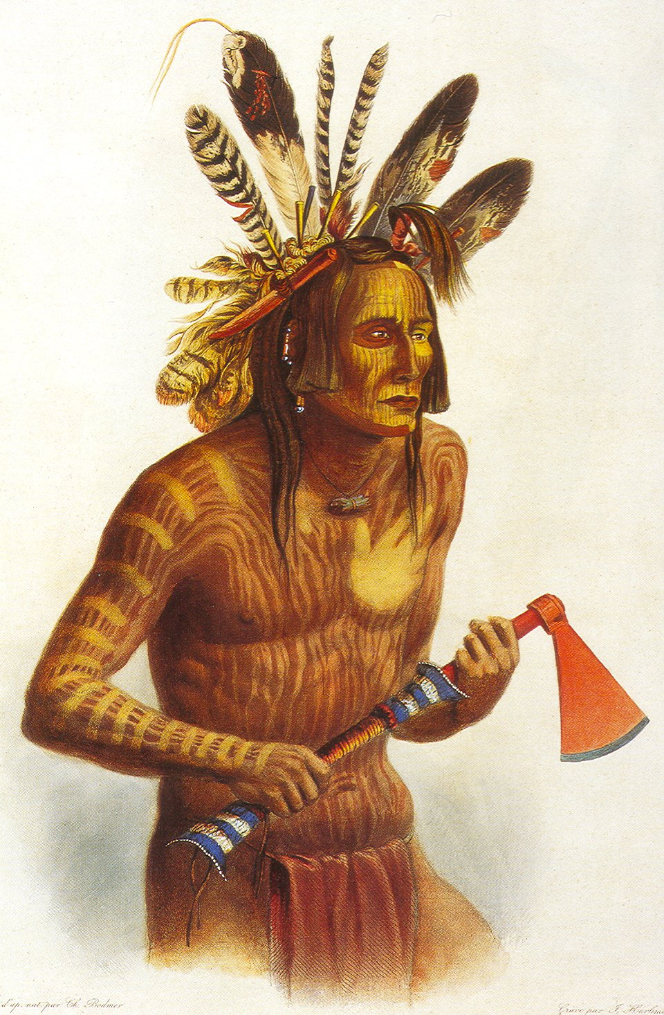 Mató-Tópe, chief Mandan